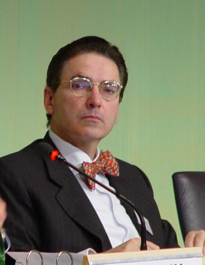 Prof. Dr. Dr. Alfred de Zayas Datum: 04/2003 Urheber: Foto wurde durch einen Freund von Prof. Alfred de Zayas erstellt (reines Gefälligkeitsfoto zu Gunsten von Prof. Alfred de Zayas; alle Bildrechte liegen bei Herrn Prof. Alfred de Zayas) Quelle: privates Fotoarchiv von Prof. Alfred de Zayas